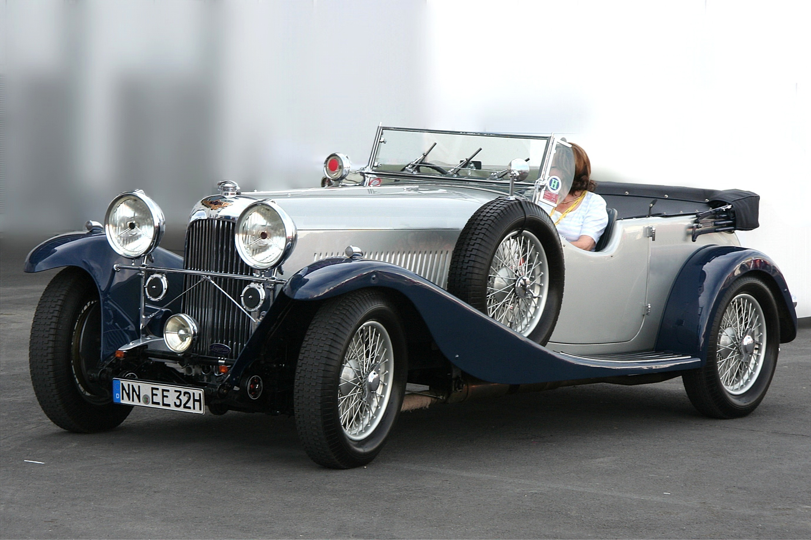 Lagonda M45 Tourer, Baujahr 1933 im Fahrerlager des Nürburgrings; Fantasiekennzeichen